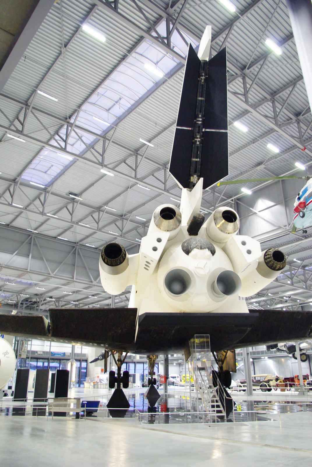 БТС 002 в техническом музее Шпайера